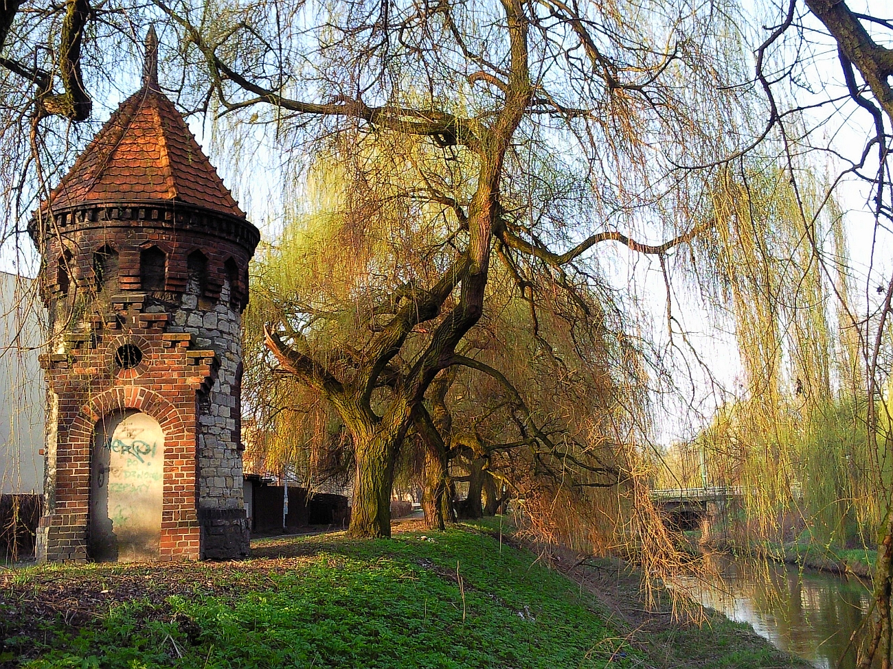 Park Sielecki − park miejski w Sosnowcu, usytuowany przylegle do dzielnicy Sielec. Linię graniczną parku wyznacza ul. 3 Maja, zabudowania dzielnicy Sielec oraz ulica Mościckiego. Największy z Sosnowieckich parków. Występuje tu około 60 gatunków drzew i krzewów, przy czym średni wiek drzew wynosi około 90 lat. Przez środek parku przepływa rzeka Czarna Przemsza. Park powstał przed rokiem 1835 po odbudowie z pożaru Zamku Sieleckiego, jako część dóbr rodziny Renardów. Uporządkowany na zlecenie hr. Andrzeja Renarda. W latach międzywojennych stał się parkiem miejskim, ogólnie dostępnym. W latach 60. XX w wyburzono część starej zabudowy parku, włącznie z ogrodzeniem. Zachowano jedynie Zamek Sielecki oraz zabytkową wieżyczkę, mieszczącą się obecnie pomiędzy blokami na wprost wejścia frontowego do hali lodowiska. W miejsce zniszczonej zabudowy parku wybudowano amfiteatr, dziś praktycznie nieistniejący, baseny kąpielowe funkcjonujące do dziś jako kąpielisko otwarte oraz sztuczne lodowiska, stanowiące bazę treningową drużyny hokejowej lokalnego klubu sportowego. W latach 90. XX w. rozmontowano słynny Pomnik Czynu Rewolucyjnego, znajdujący się wówczas w centralnym punkcie parku. Sławę pomnikowi przyniosła wysoka konstrukcja rurowa. Po zlikwidowanym pomniku pozostał marmurowy podest oraz przyległy plac. Na miejscu dawnego pomnika wybudowano nowy monument. Obecny pomnik składa się z wizerunku orła białego (orzeł z godła Polski) oraz napisu: " Wolność Praca Godność ". W roku 2005, 9 czerwca powstał w zachodniej części parku, w pobliżu lodowiska Skatepark. Jest on drugim obiektem po drewnianym placu zabaw urozmaicającym wypoczynek w parku. Podest wokół obecnego pomnika adaptowany jest często na scenę muzyczną. W parku odbywają się imprezy cykliczne jak Dni Miasta, Dni Sportu czy Majówka Europejska. Na popularnych imprezach na terenie parku rozbijają się stragany oraz luna park.